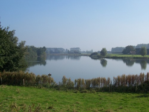 Zwaakse Weel. Zeêuws: De Zwaekse Weêl in de Zak van Zuid-Beveland.